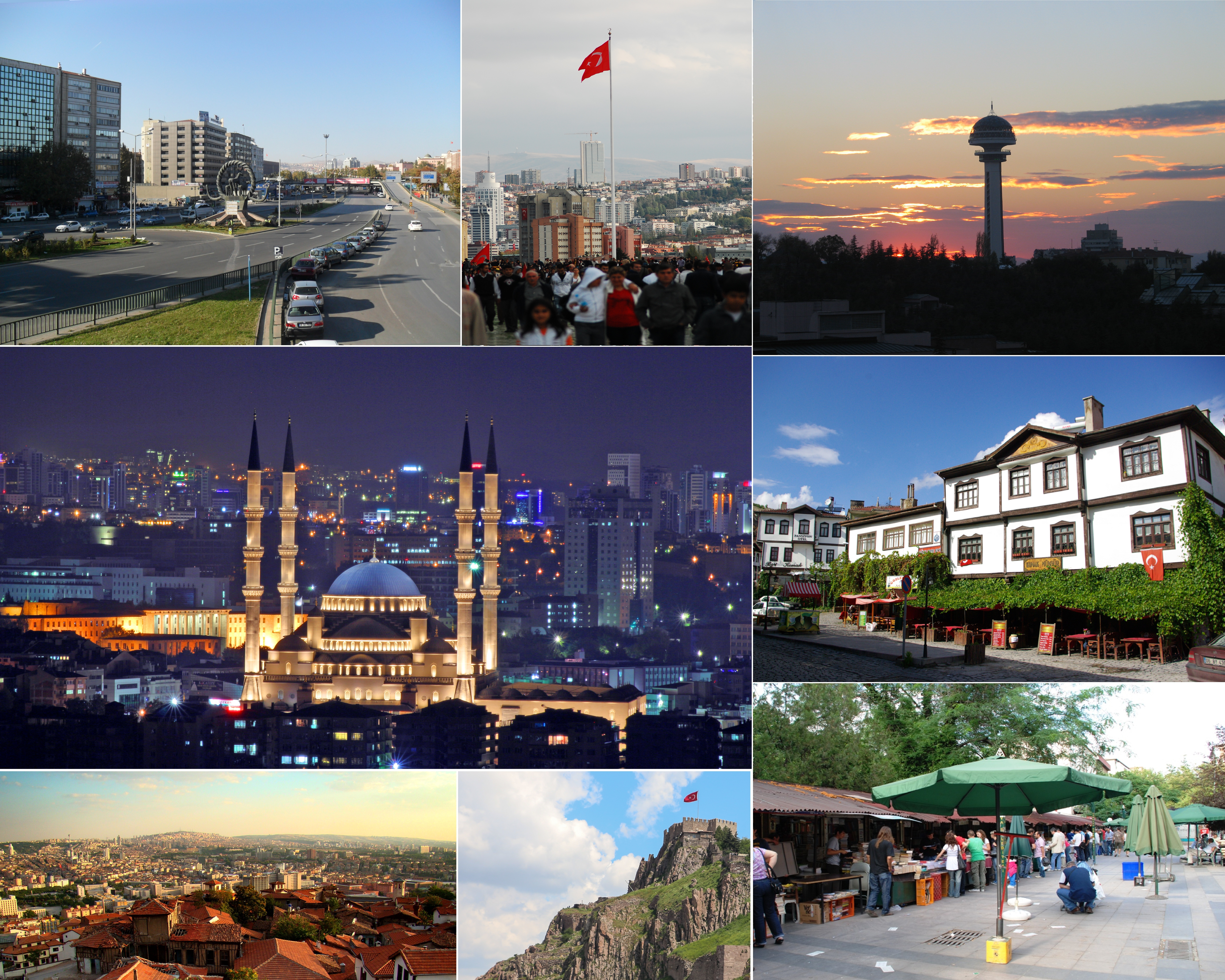 Sağ baştan itibaren: Hitit Güneş Kursu Anıtı (Sıhhiye Meydanı), Anıtkabir'den Tandoğan manzarası, Atakule, Kocatepe Camii, Beypazarı, Ankara manzarası, Ankara Kalesi ve Olgunlar Sokak. (Commons lisanslı ya da yüklü görsel materyallerle desteklenmiş Ankara kolaj çalışması)